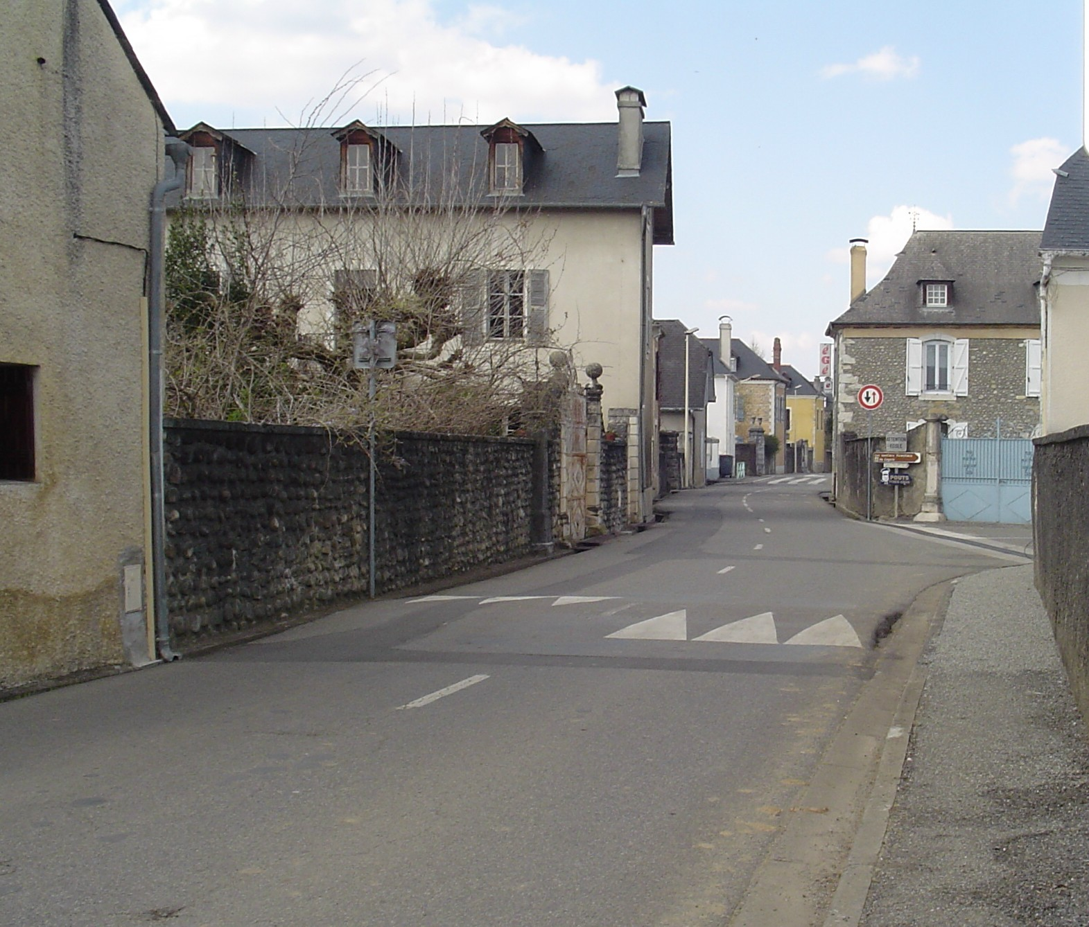 Carrèra de Bordèras